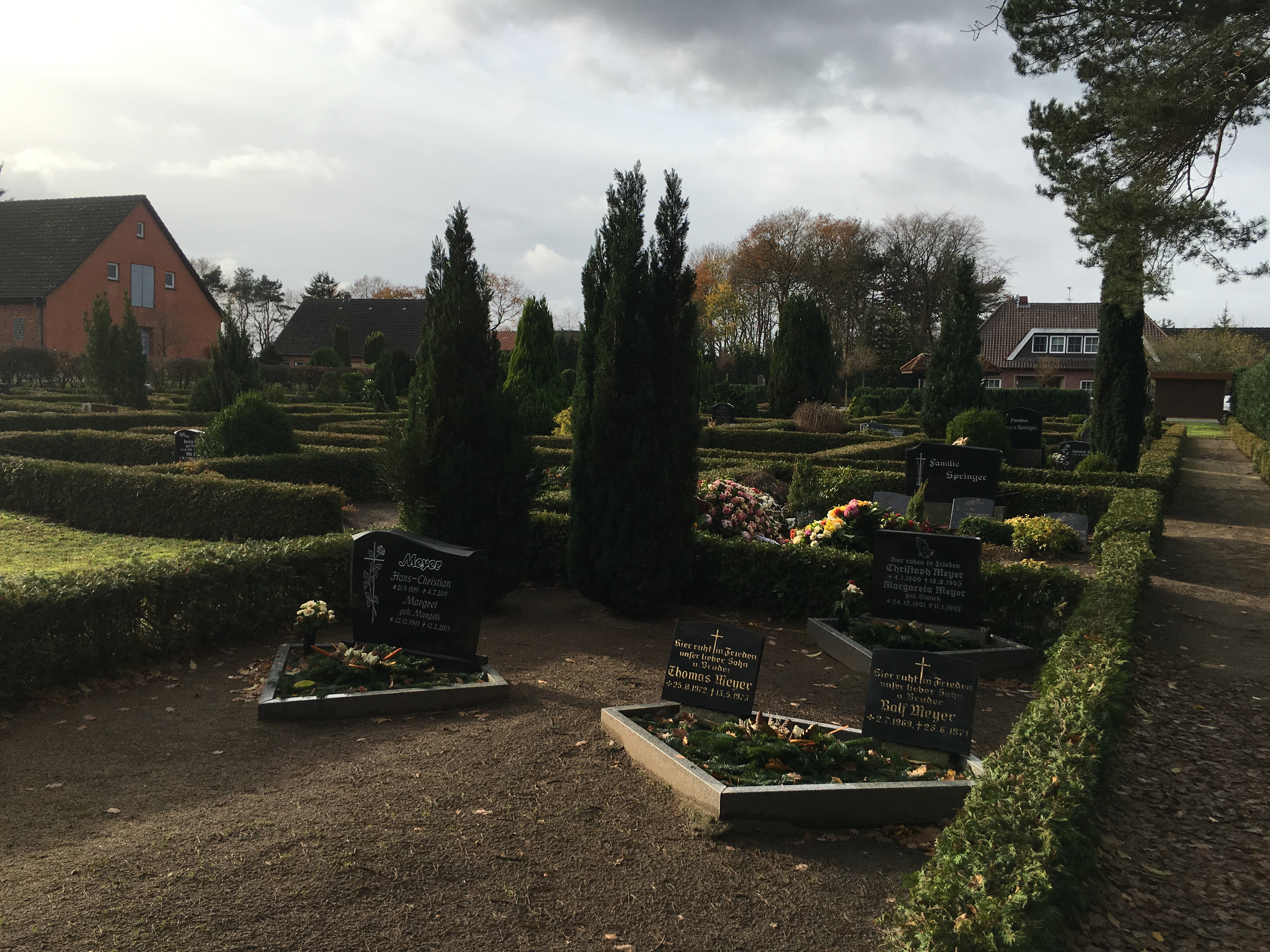 Karkhoff in Langeln